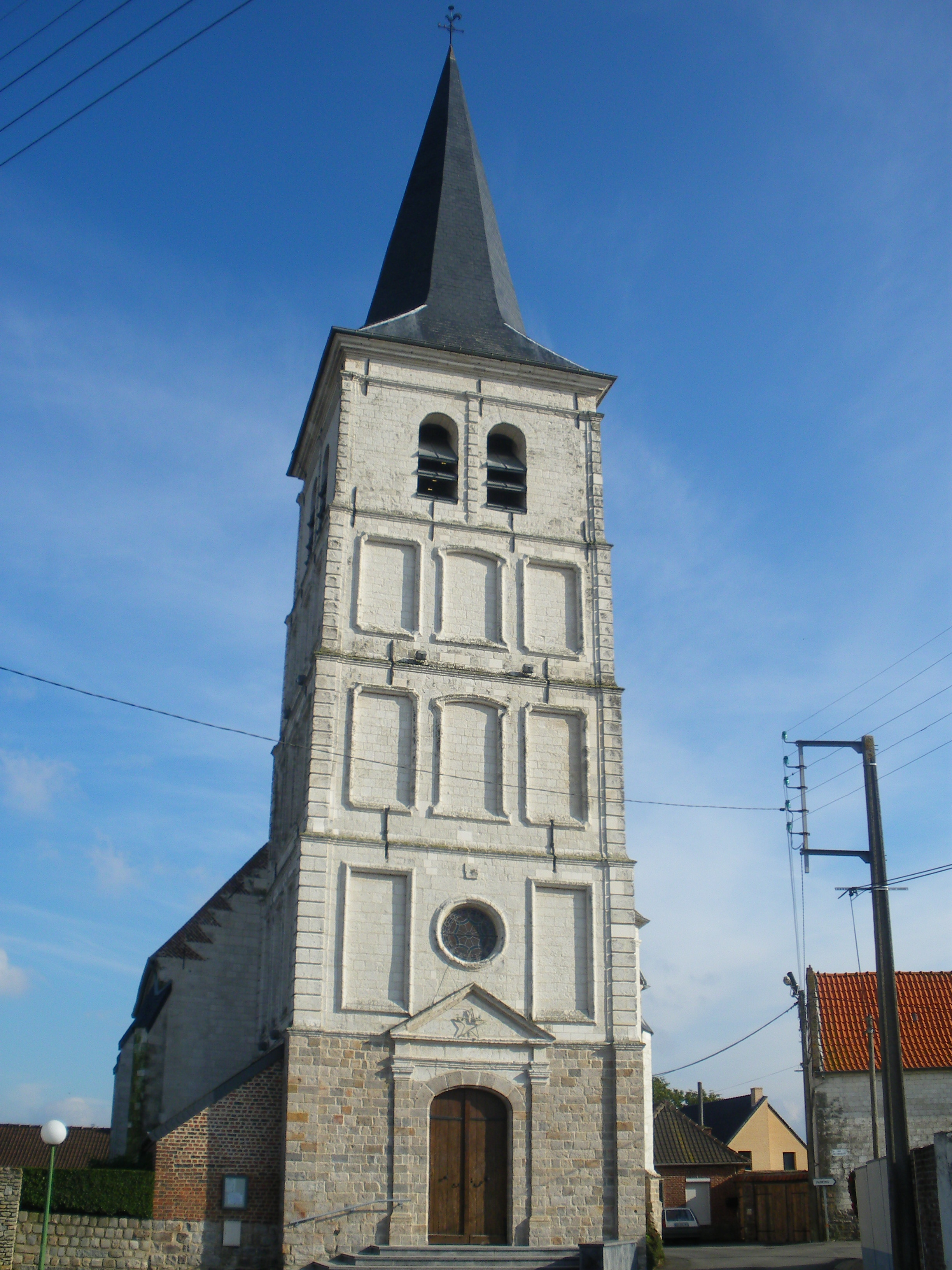 Vue de l'église Saint-Omer d'Houchin.